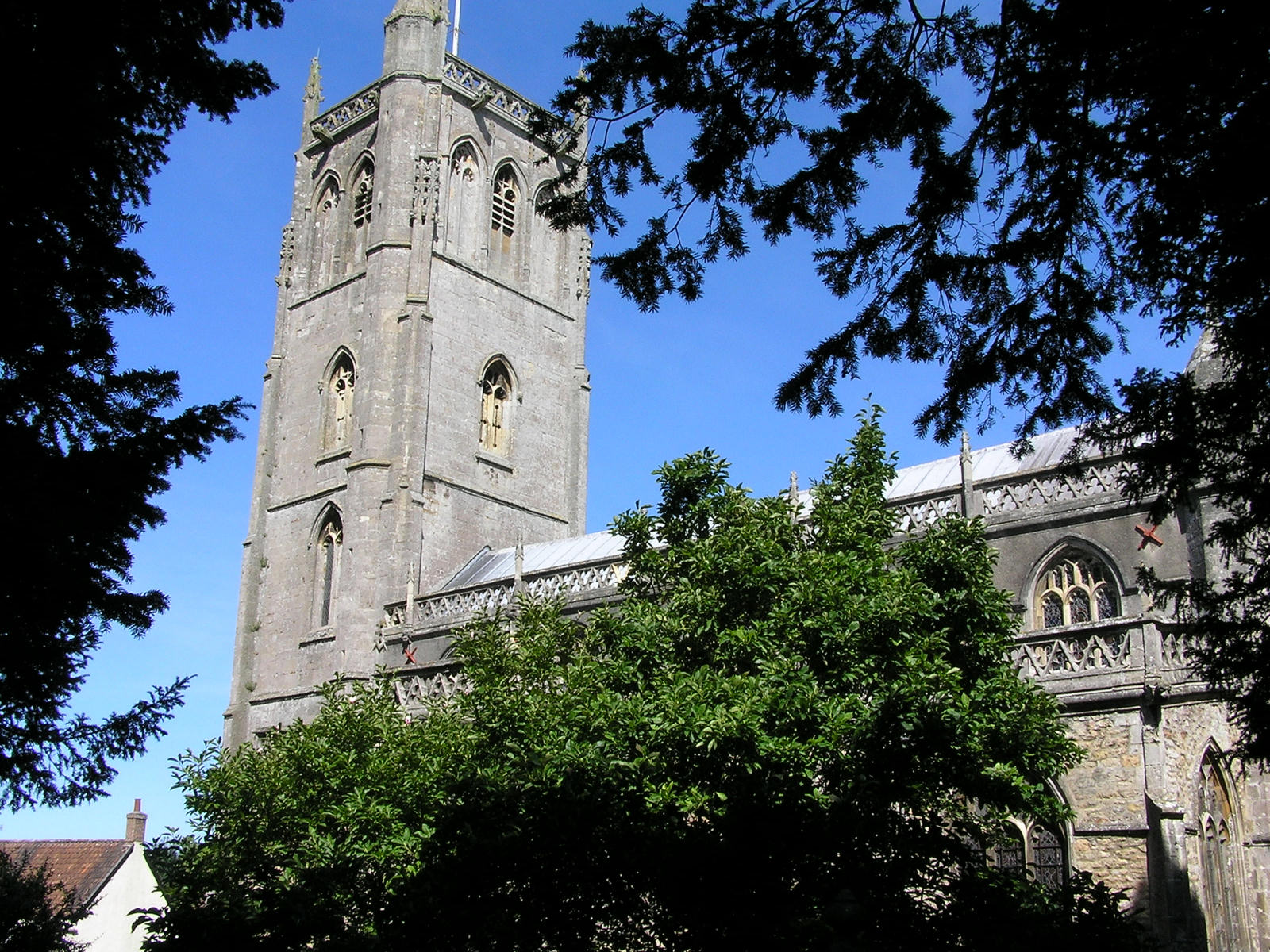 Banwell church